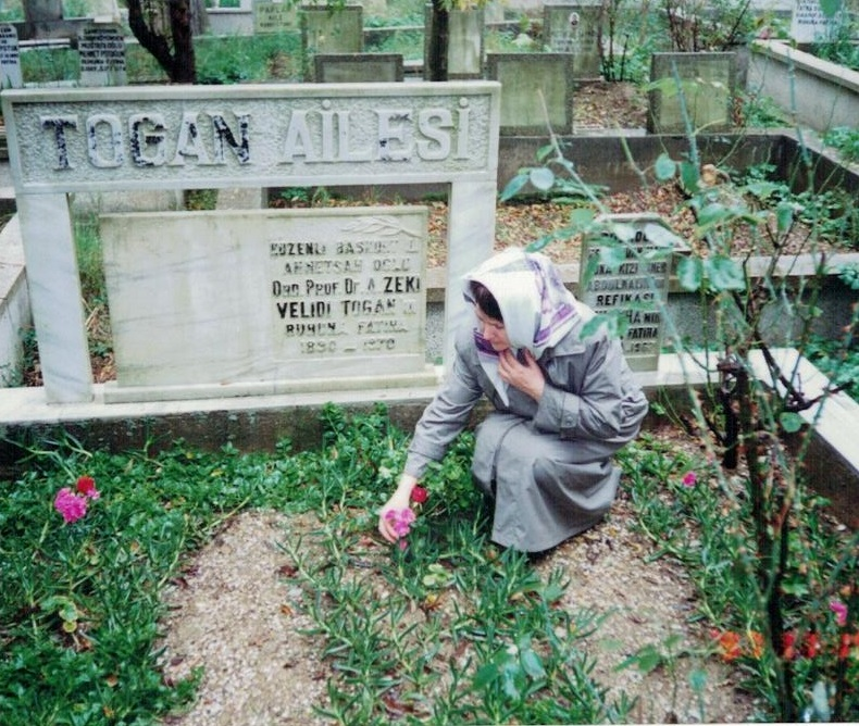 З. Вәлиди ҡәбере. Төркиә